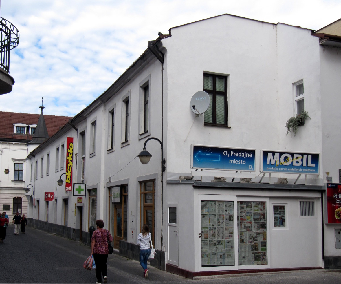 Žilina, Bottova ul. 1, Folkmanovský dom